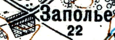 Топографическая карта Ленинградской области, квадрат Vc-29 (Батецкая), деревня Заполье